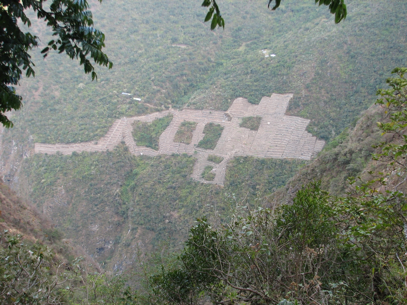 "Esta foto muestra las terrazas de la ciudadela de Choquequirao, JMK"